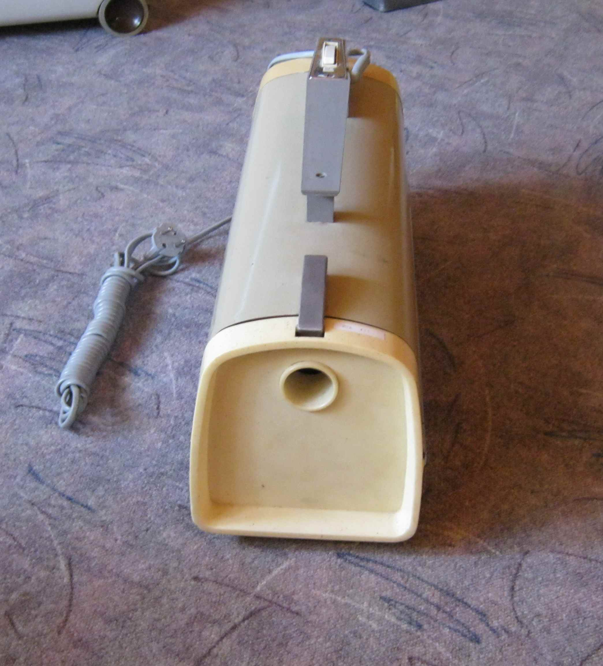 Česky: ETA 411